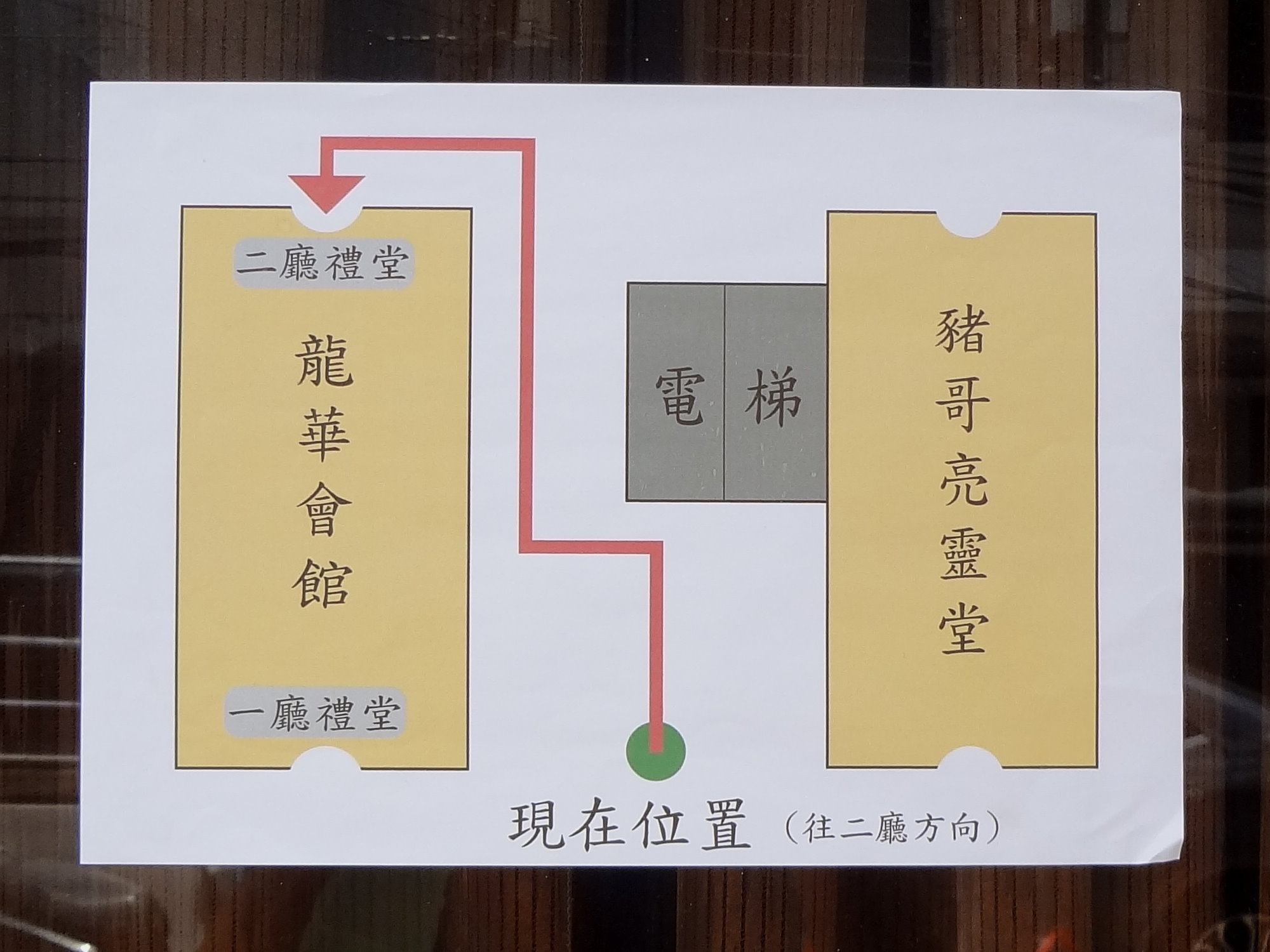 新北市板橋區長江路一段7號1樓，龍華會館大門右側玻璃窗張貼的豬哥亮靈堂地圖。